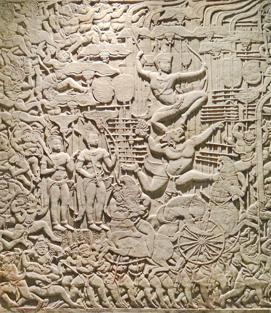 Moulage d'une section du bas-relief de la "bataille de Lanka" Angkor Vat, aile ouest de la galerie de la troisième enceinte (galerie des bas-reliefs), coté nord Scène du Ramayana montrant Rama debout sur le singe Hanuman, suivi de Laksmana, le frère de Rama et de Vibhisana Mission Louis Delaporte 1873 Tirage en plâtre d'après un estampage à la terre Plâtre patiné, montage filasse sur armature de bois Moulage présenté dans l'exposition "Angkor : la naissance d'un mythe" (musée Guimet) Voir le classeur de dalbera sur le Cambodge (notamment les monuments d'Angkor) On ne peut qu'être qu'admiratif de la qualité de ce moulage et de la finesse de ce bas-relief qui représente la bataille de Rama et de ses alliés, les singes contre les démons, en vue de libérer Sita.